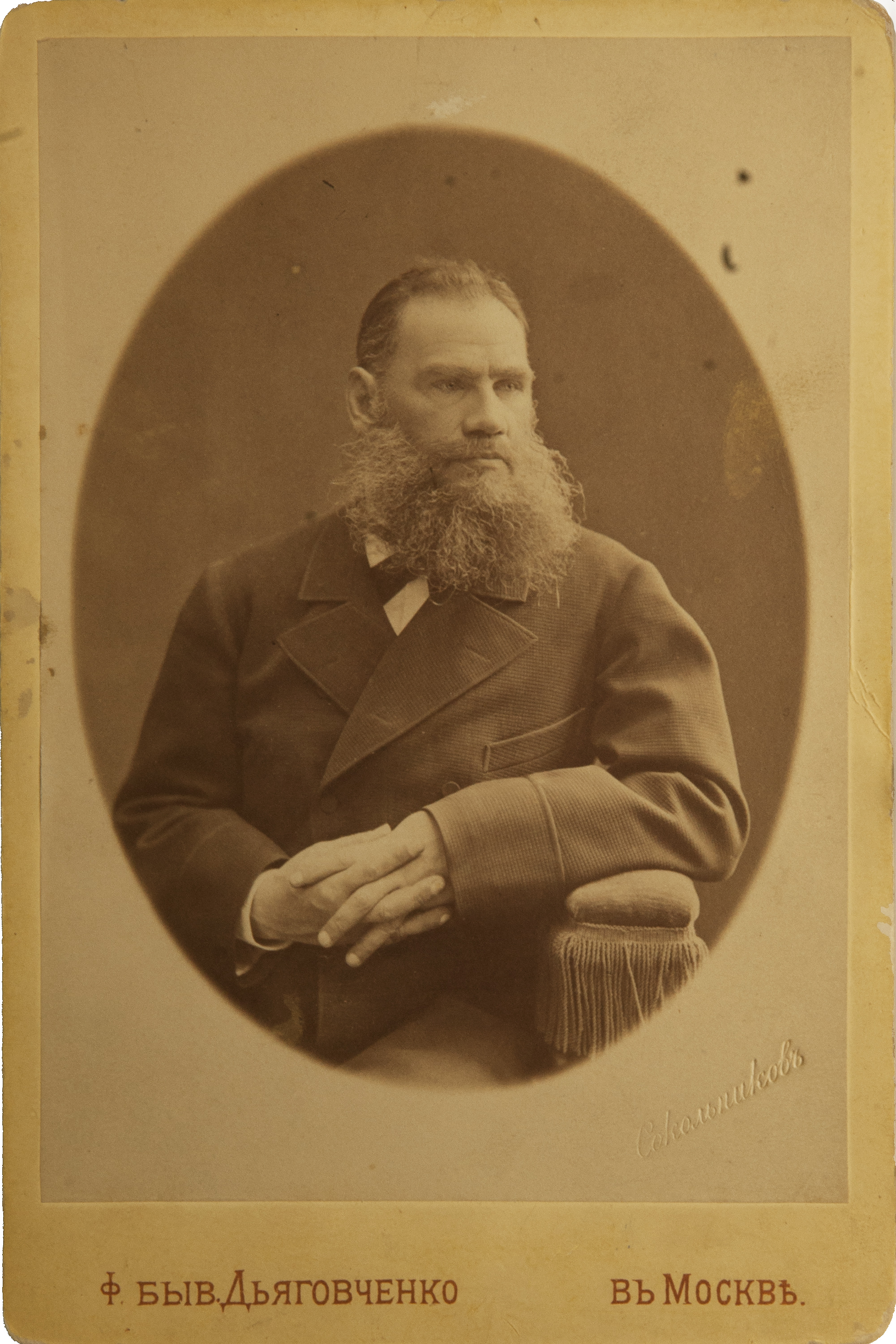 Поколенный портрет Л.Н. Толстого на кабинетном бланке, на тёмном фоне, голова 3/4 вправо, корпус прямолично, в тёмном сюртуке и галстуке и белой рубашке, руки согнуты в локтях, пальцы рук сомкнуты между собой. Сидит в кресле, положив локоть левой руки на обитый тканью подлокотник с бахромой. Внизу на бланке название ателье. Снимок сделан во время работы писателя над романом «Анна Каренина». 1876 г., Гор. Москва